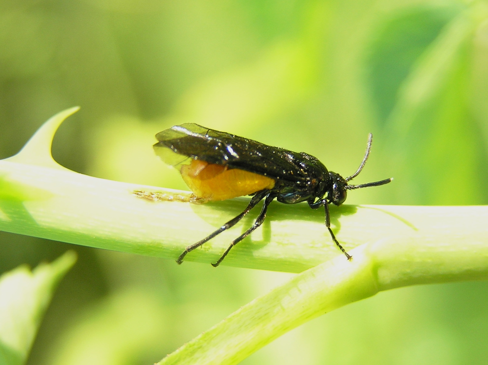 Arge pagana, Brok, Polska